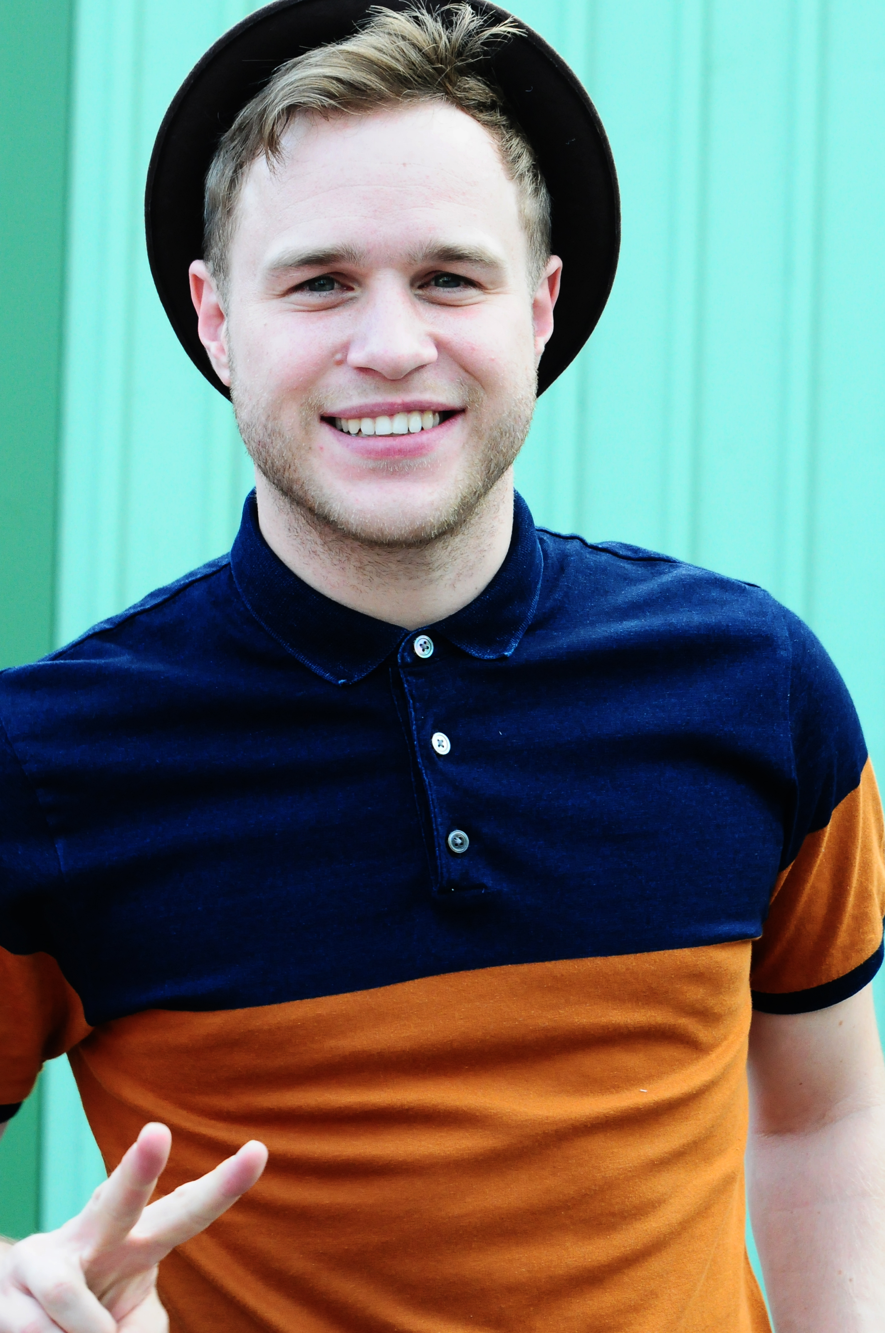 Olly Murs Sommarkrysset 2012